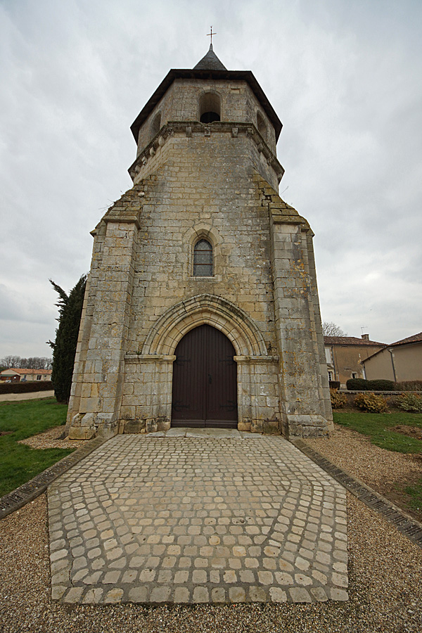 Église Saint-Hilaire de Jardres, (Classé, 1913) .